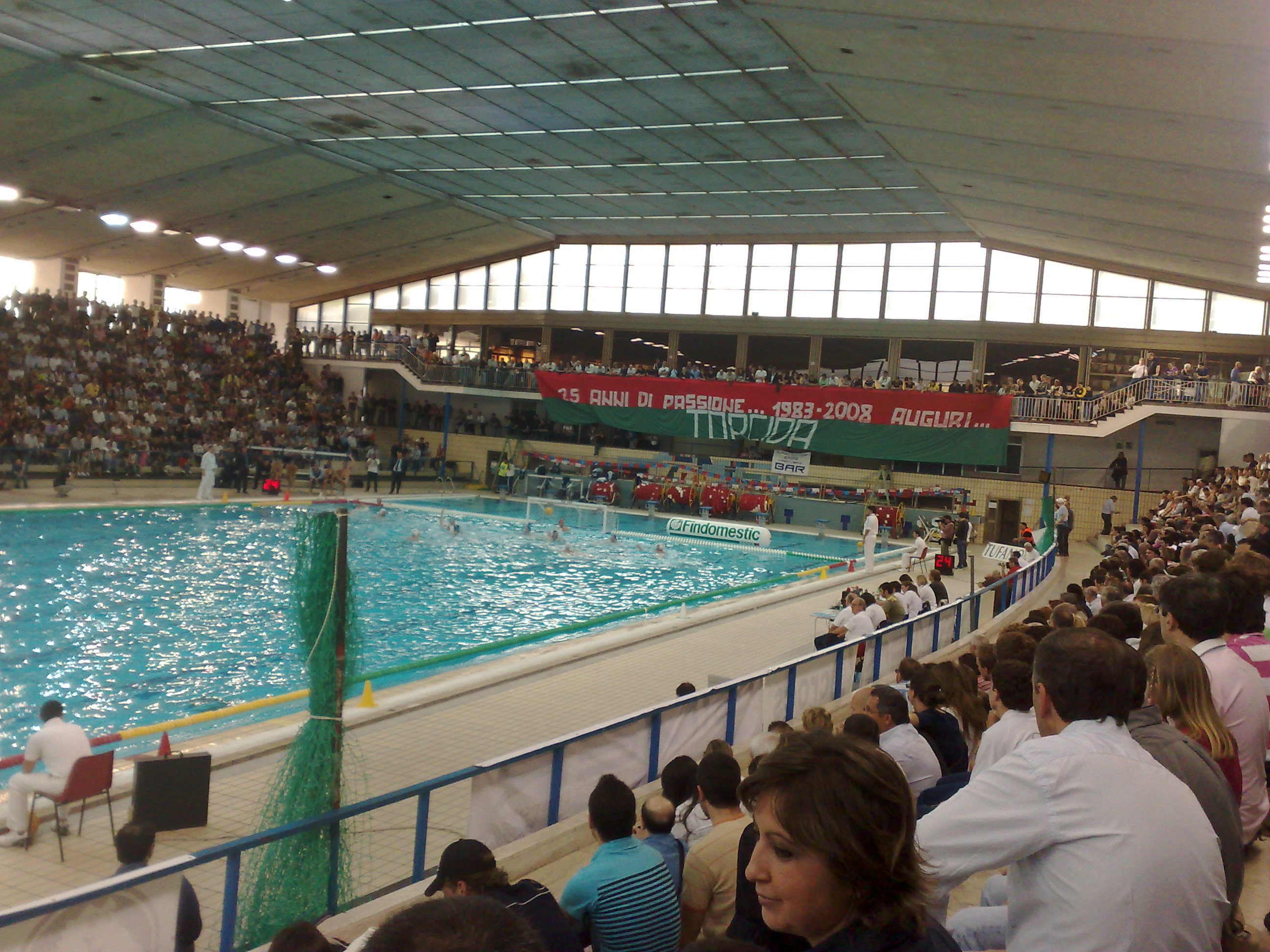 La Piscina "Felice Scandone" di Napoli, Italia.